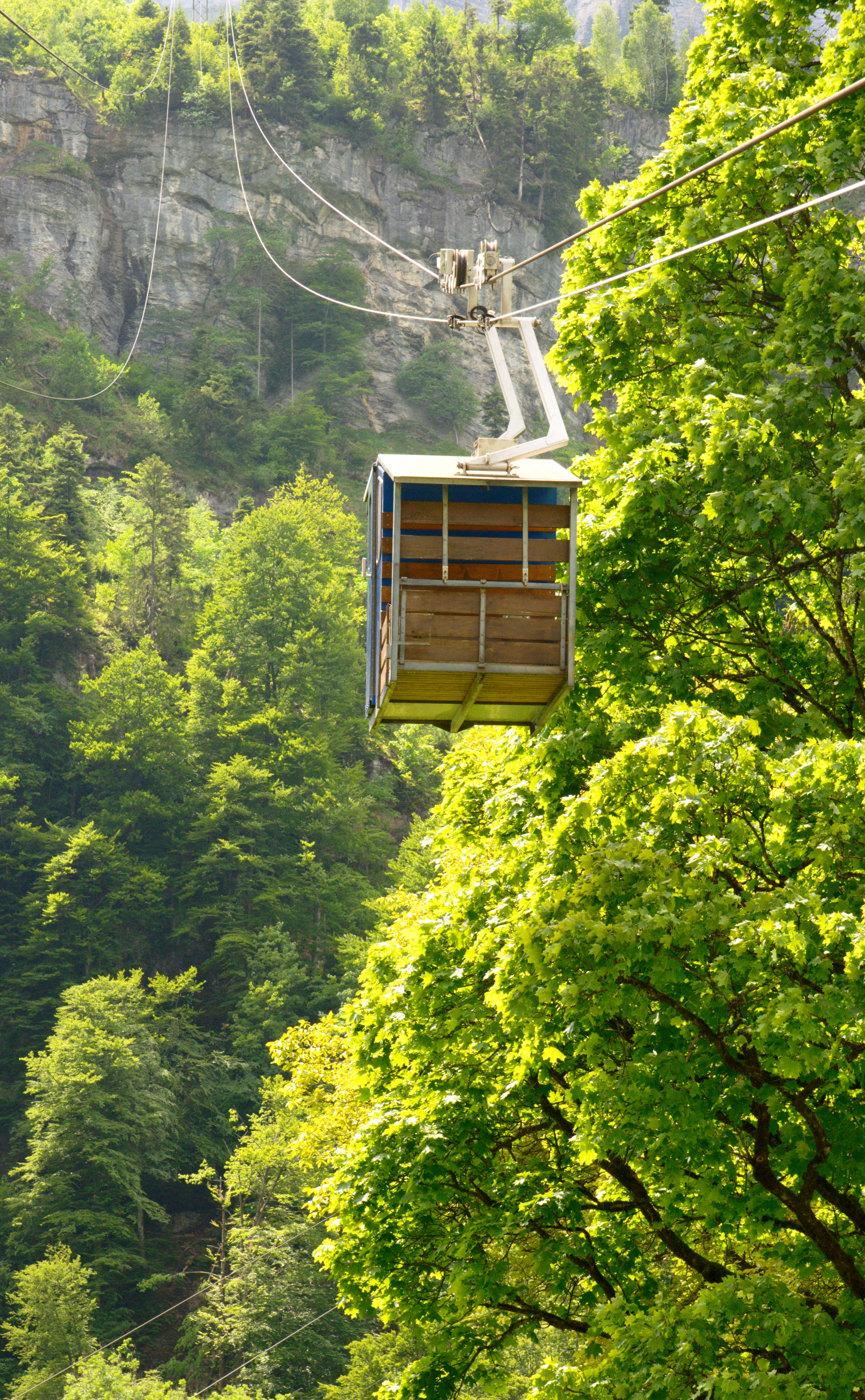 Buirebähnli Rugisbalm, Gondel oberhalb der Talstation schwebend